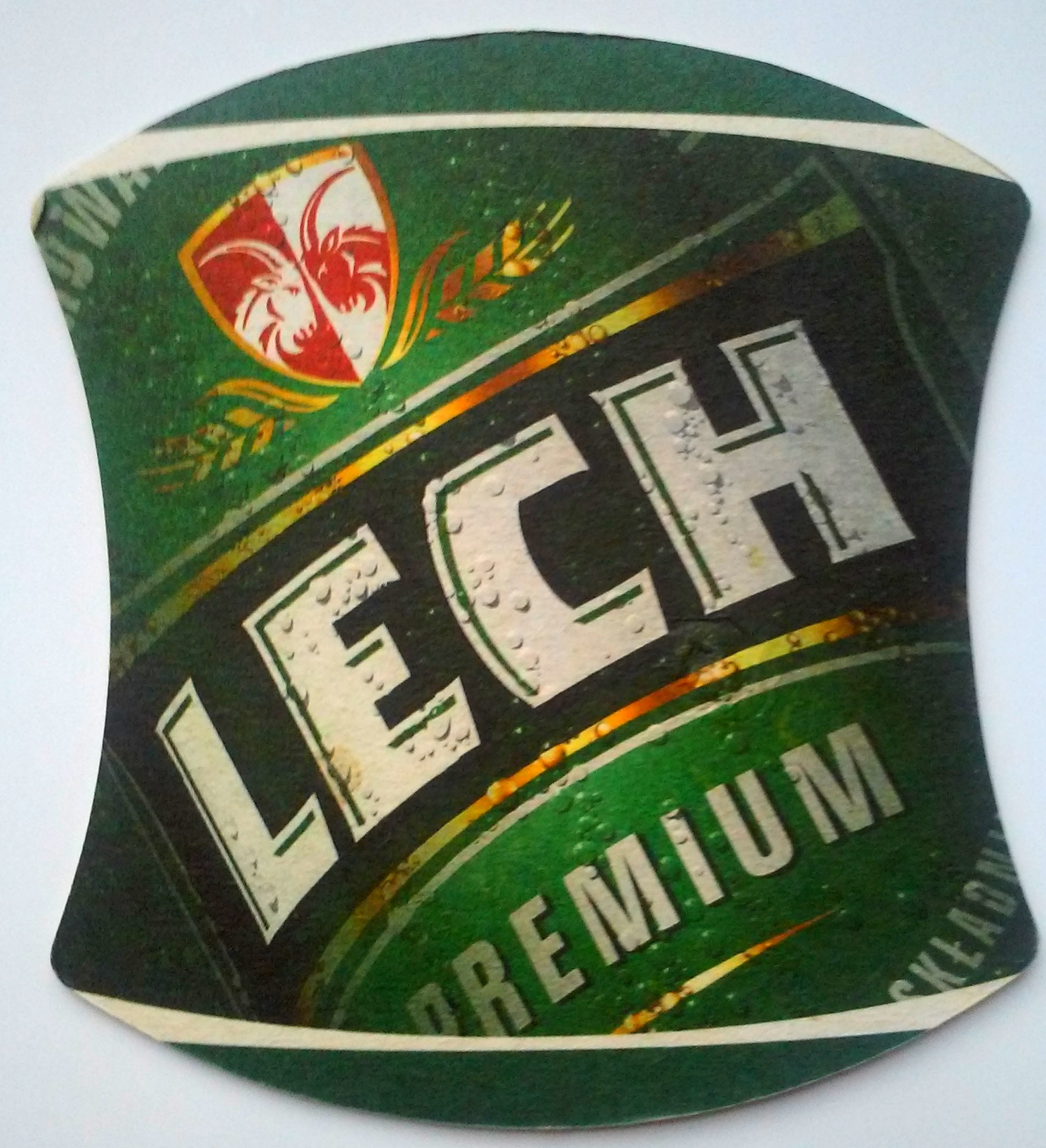 Podstawka pod piwo Lech